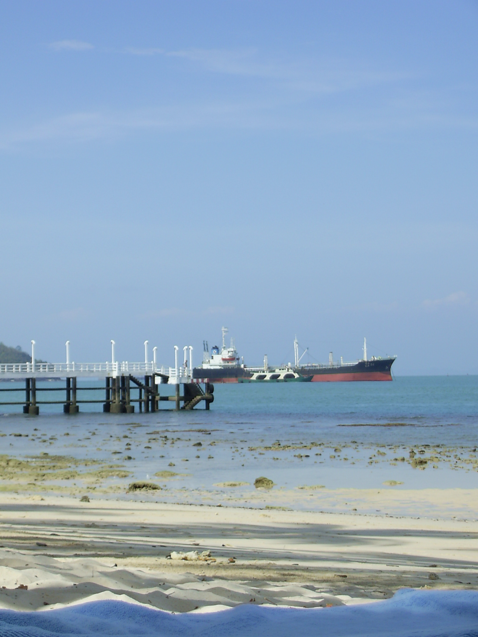 Cape Panwa Hotel